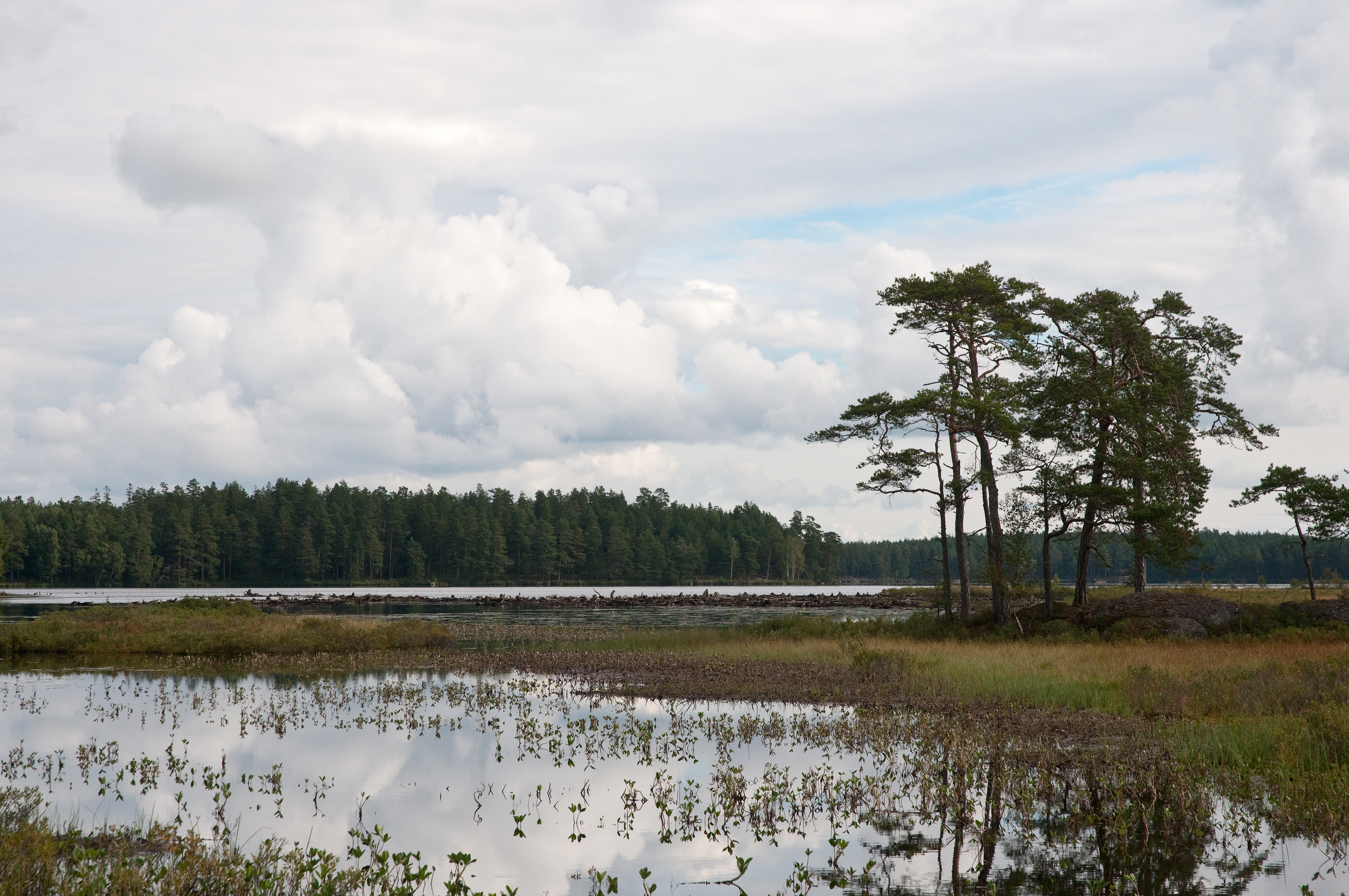 Sydvästra delen av Nävsjön i augusti 2010